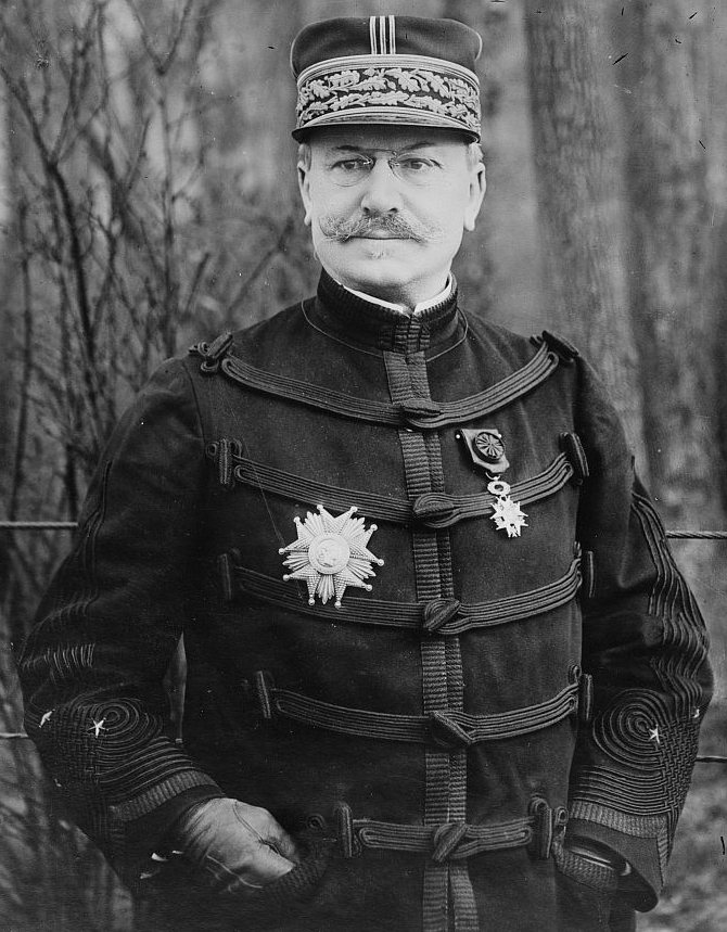 French general Louis Archinard (1850-1932)